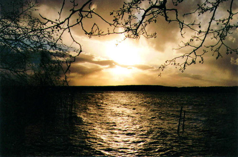 Scharmuetzelsee bei Diensdorf